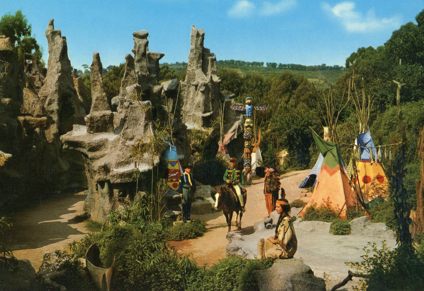 Edenlandia (Napoli) nel 1965